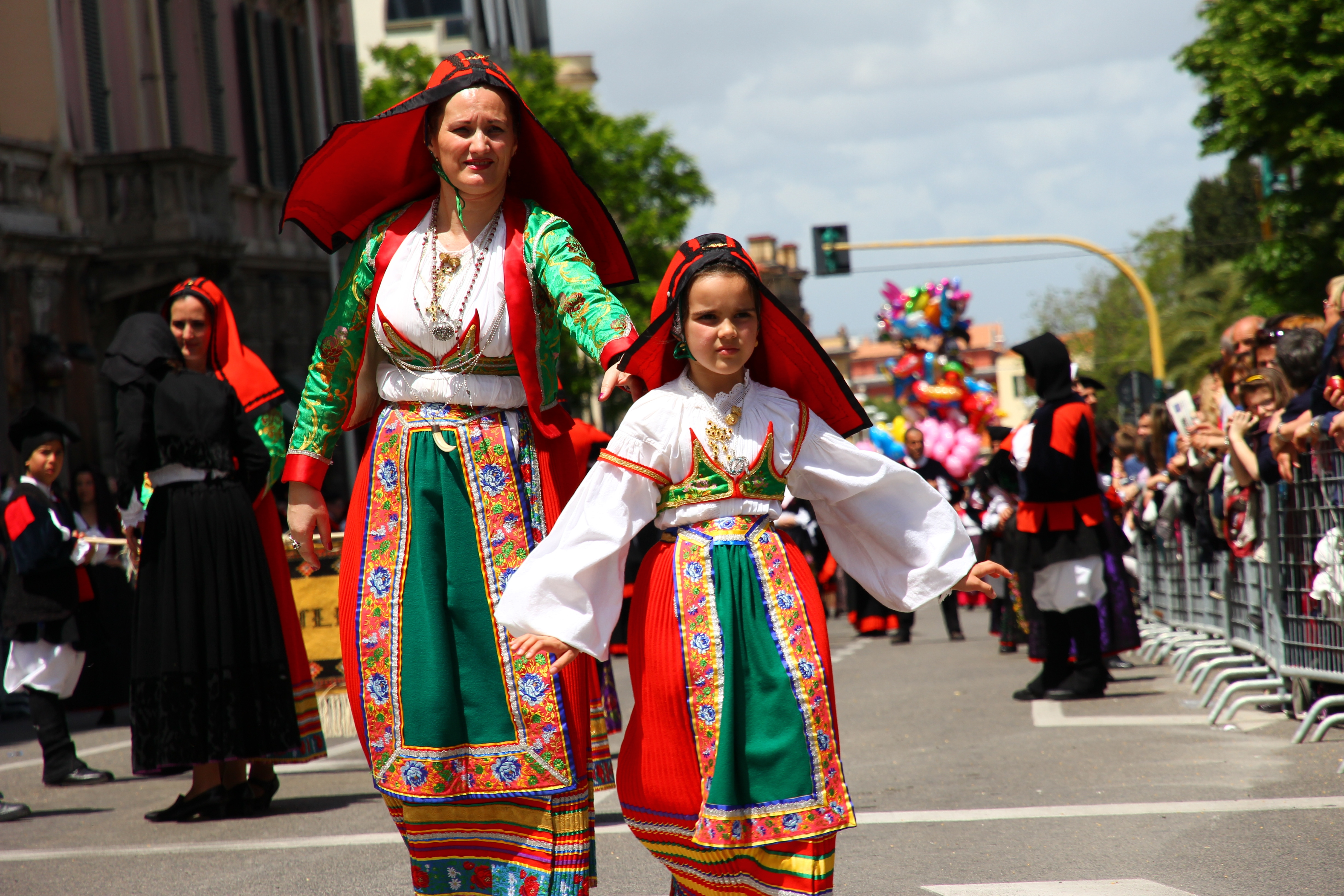 Cavalcata Sarda 2013 (Sassari)